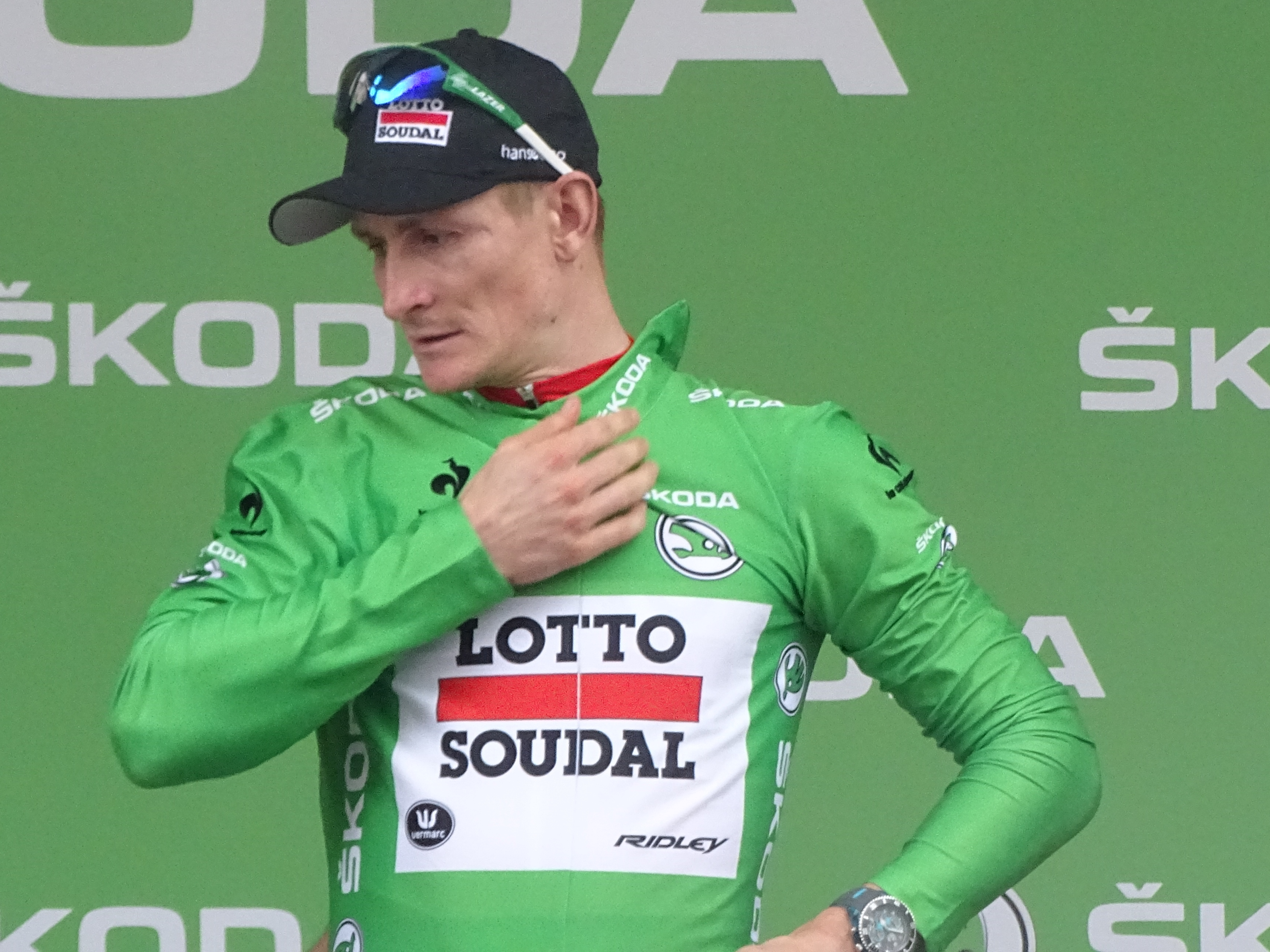 Reportage réalisé le mardi 7 juillet à l'occasion de l'arrivée de la quatrième étape du Tour de France 2015 à Cambrai, Nord-Pas-de-Calais, France.